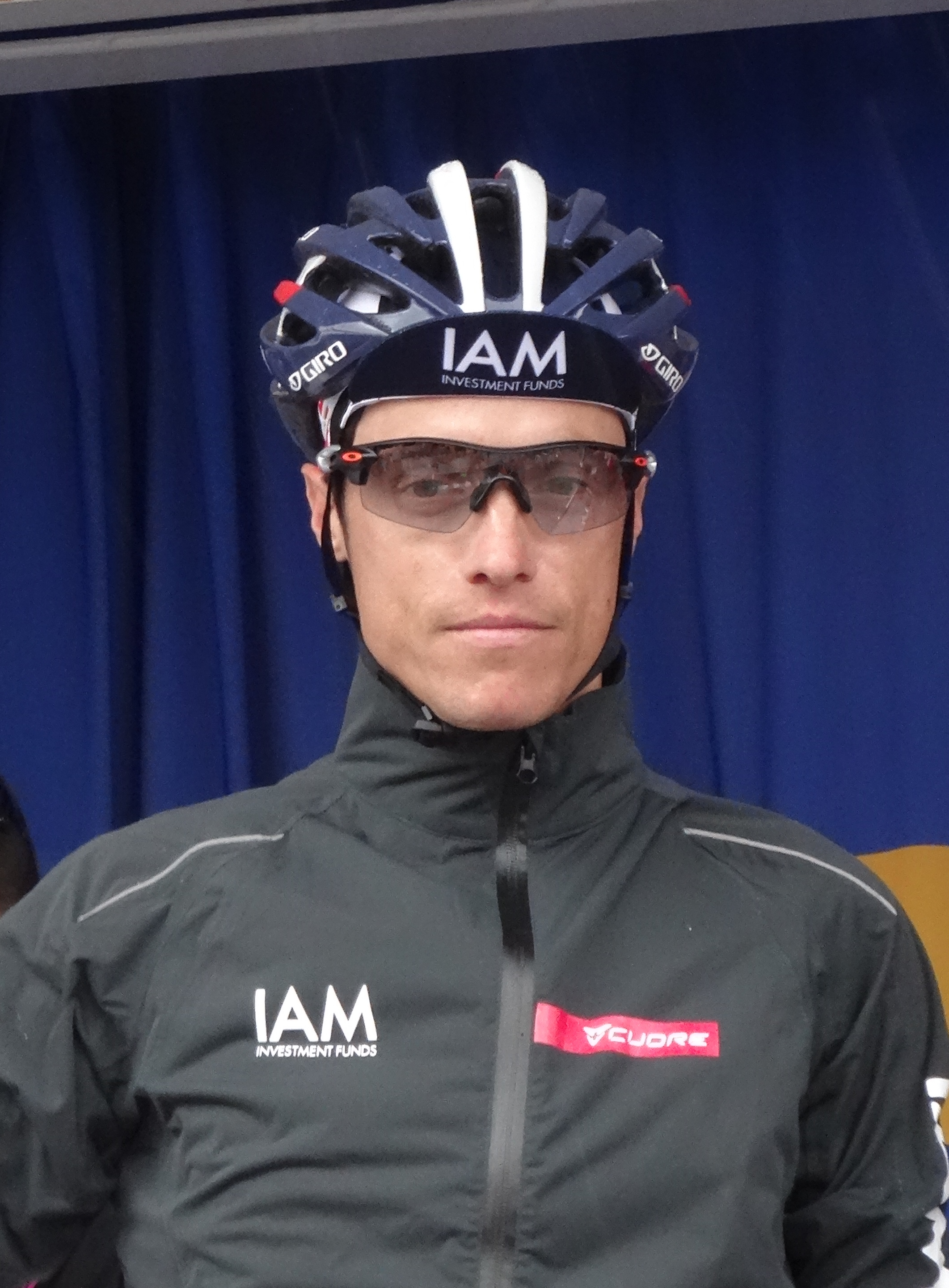 Reportage photographique réalisé le jeudi 8 mai 2014 au départ de la deuxième étape de l'édition 2014 des Quatre jours de Dunkerque à Hazebrouck, Nord, Nord-Pas-de-Calais, France. Depicted person: Sylvain Chavanel Depicted team: IAM